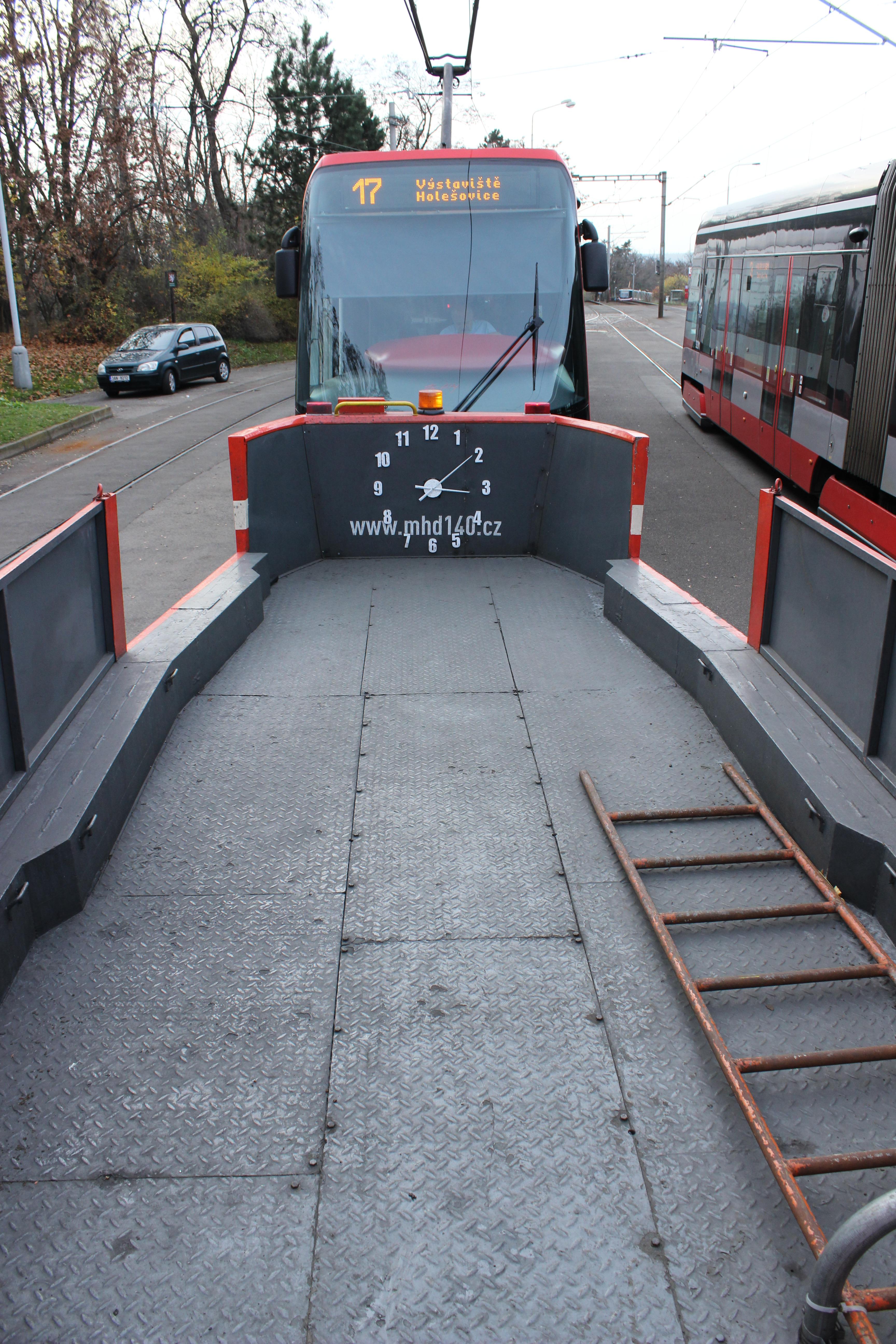 Pracovní tramvaj T3M evidenční číslo 5572. Vyfotografováno laskavostí pracovníků Dopravního podniku hlavního města Prahy – Milana Slunečka, Jiřího Štábla a Martina Brejši.